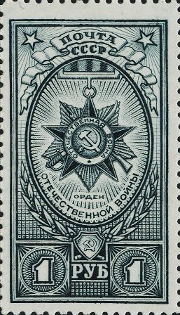 Серия «Ордена СССР»: Орден Отечественной войны, сине-стальная.